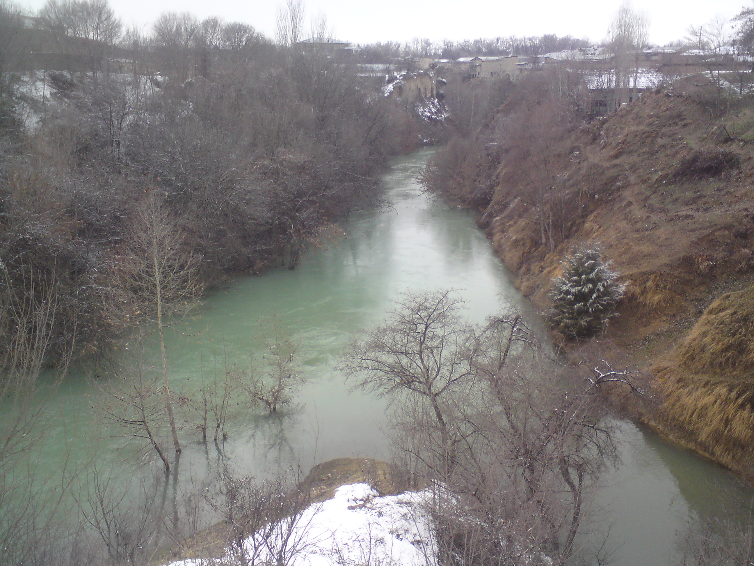 Канал Актепа (слева) впадает в канал Бозсу (или Нижний Бозсу), город Ташкент